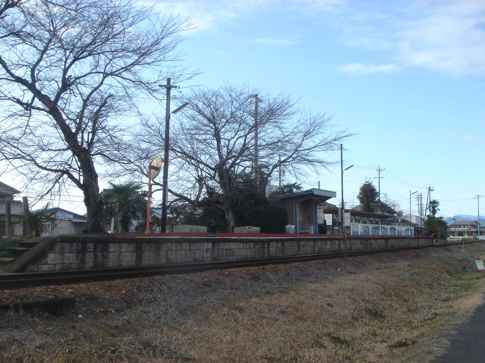 Kamono Station (長良川鉄道越美南線、加茂野駅）,Minokamo,Gifu,Japan(岐阜県美濃加茂市)で撮影。